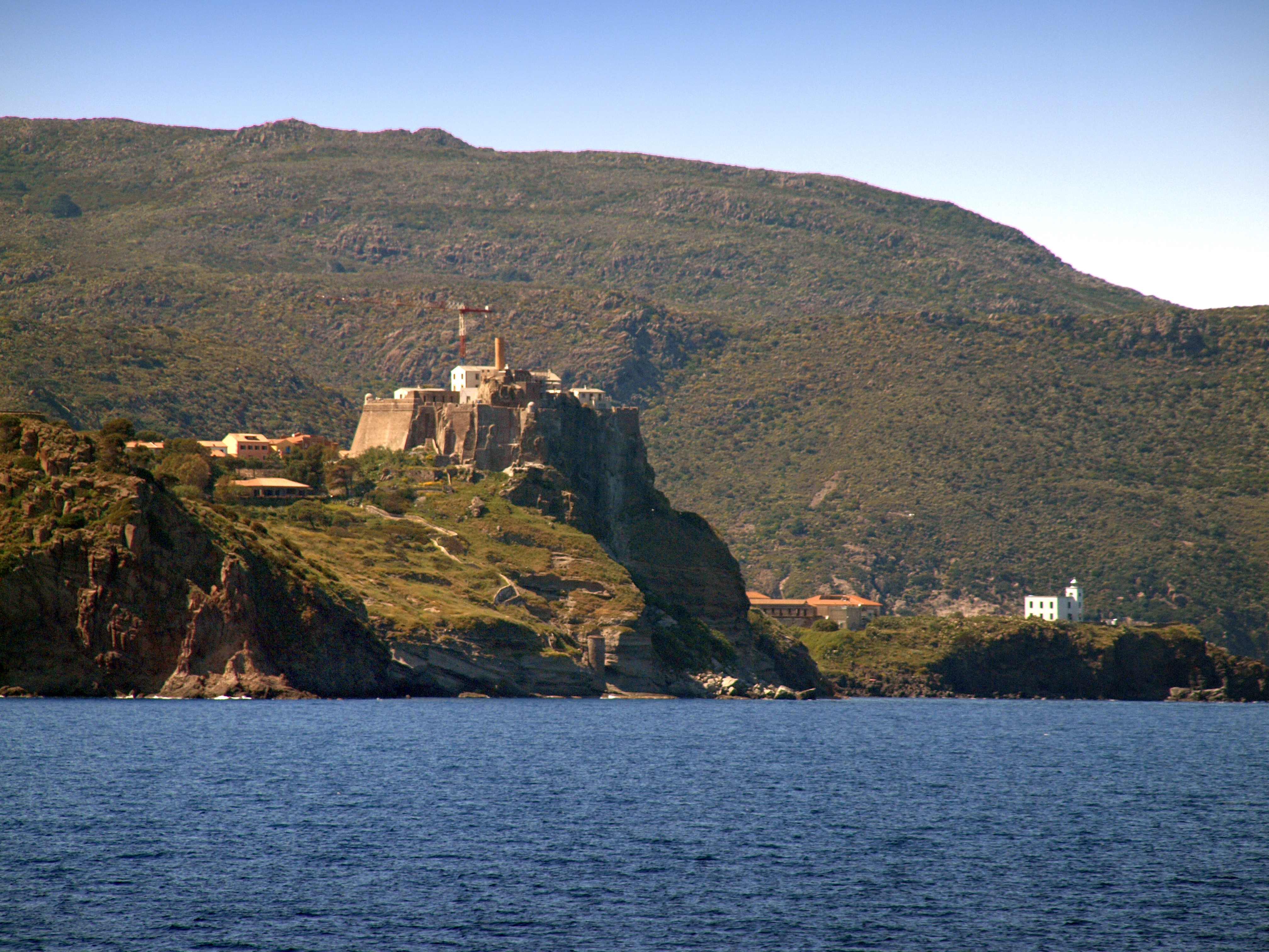 Capraia (Livourne), Toscane (Italie) - Forteresse de San Giorgio